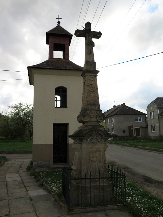 Krucifix, náves, Olbramice (okres Olomouc).